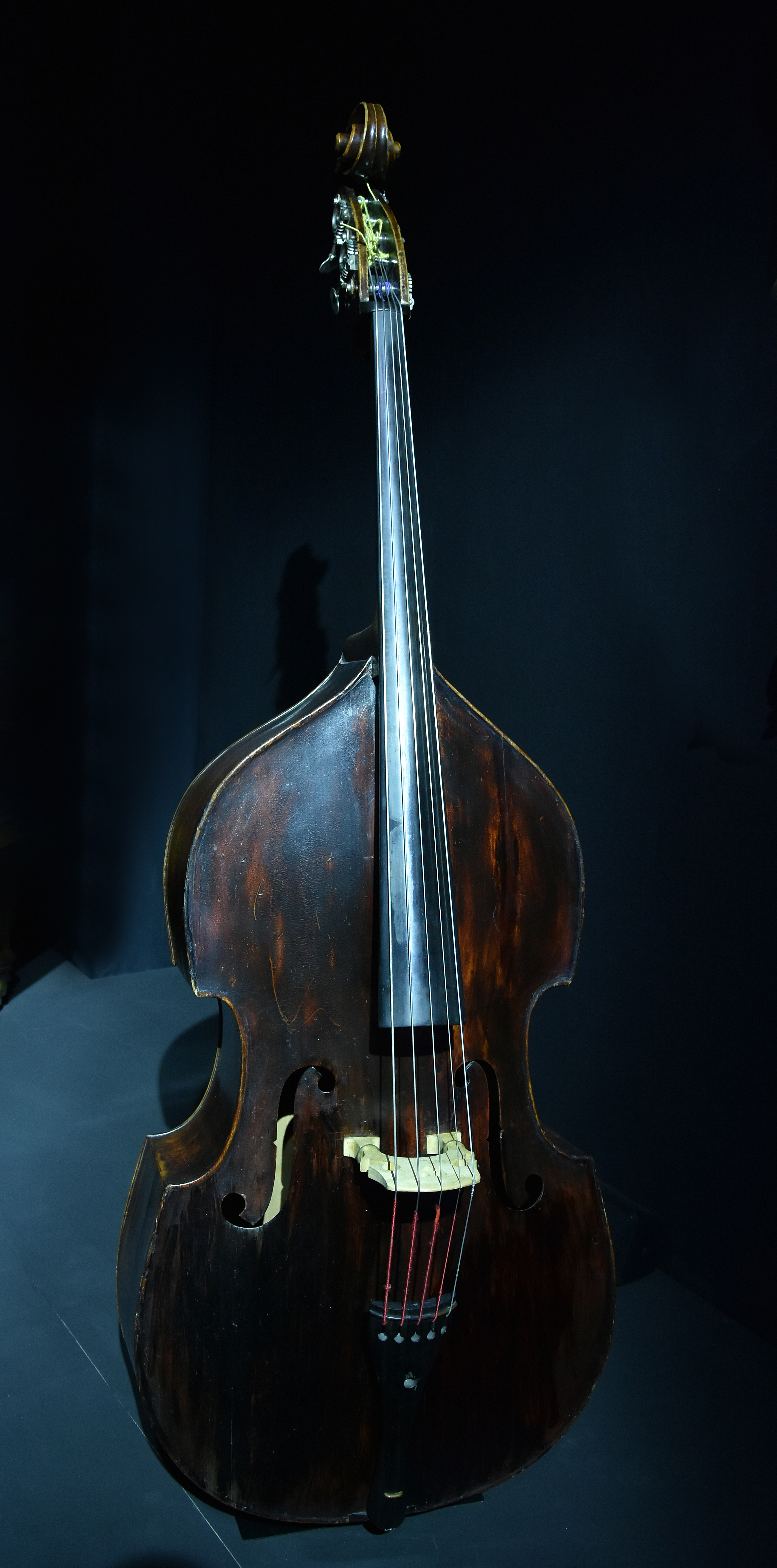 Contrabas van Jean Warland Brafa 2019 31-01-2019